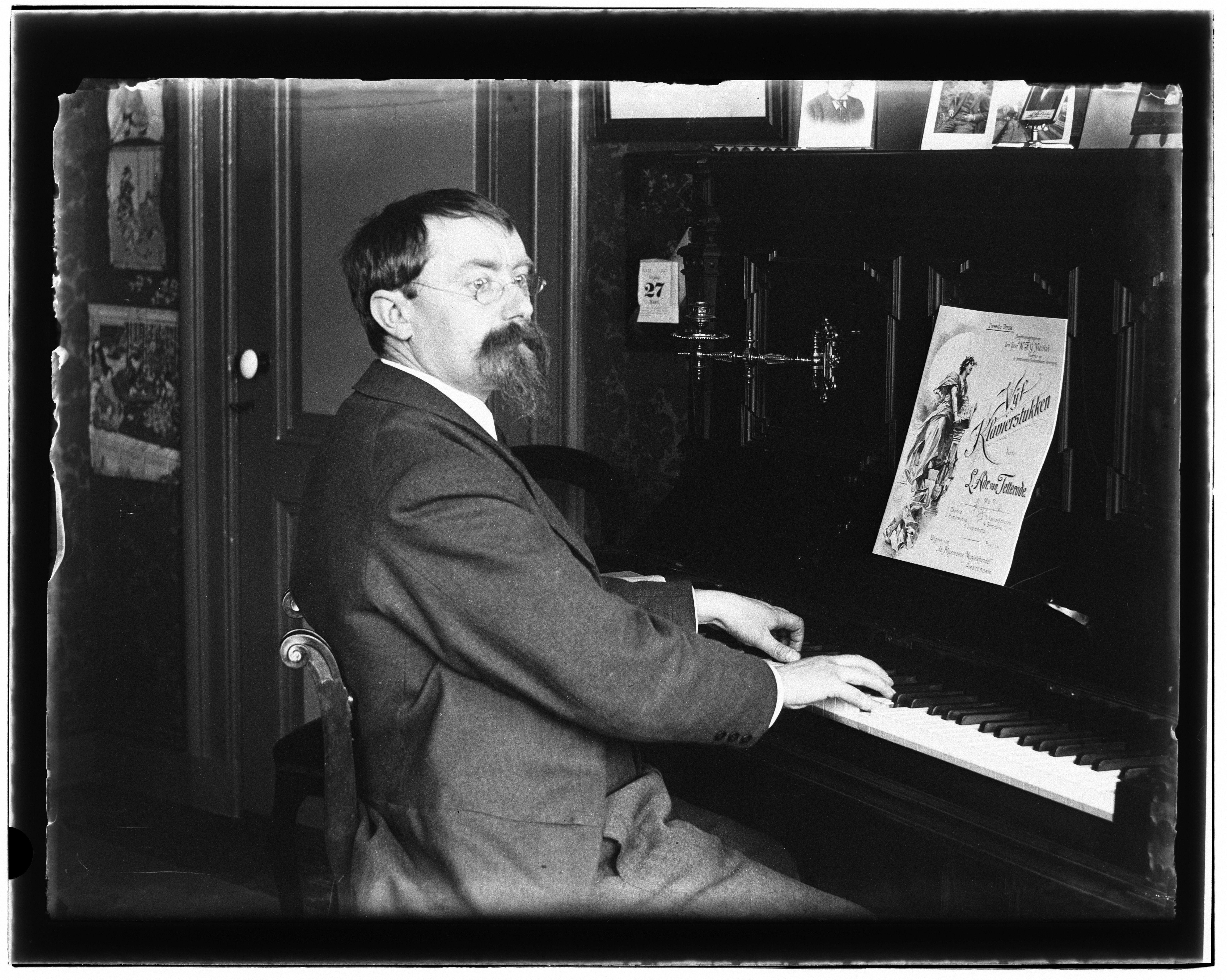 Beschrijving Lambertus Adrianus van Tetterode (1858-1931) Musicus, componist, muziekonderwijzer. Aan de piano in zijn woning Nassaukade 117. Documenttype foto Vervaardiger Olie, Jacob (1834-1905) Collectie Collectie Jacob Olie Jbz. Datering 27 maart 1896 Inventarissen Afbeeldingsbestand 10019A001788 Generated with Dememorixer